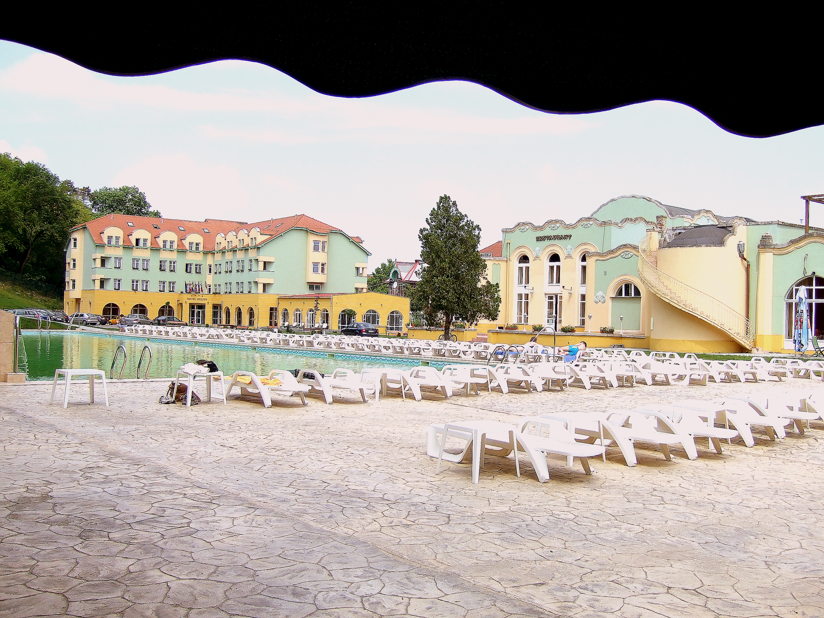 chaises-longues